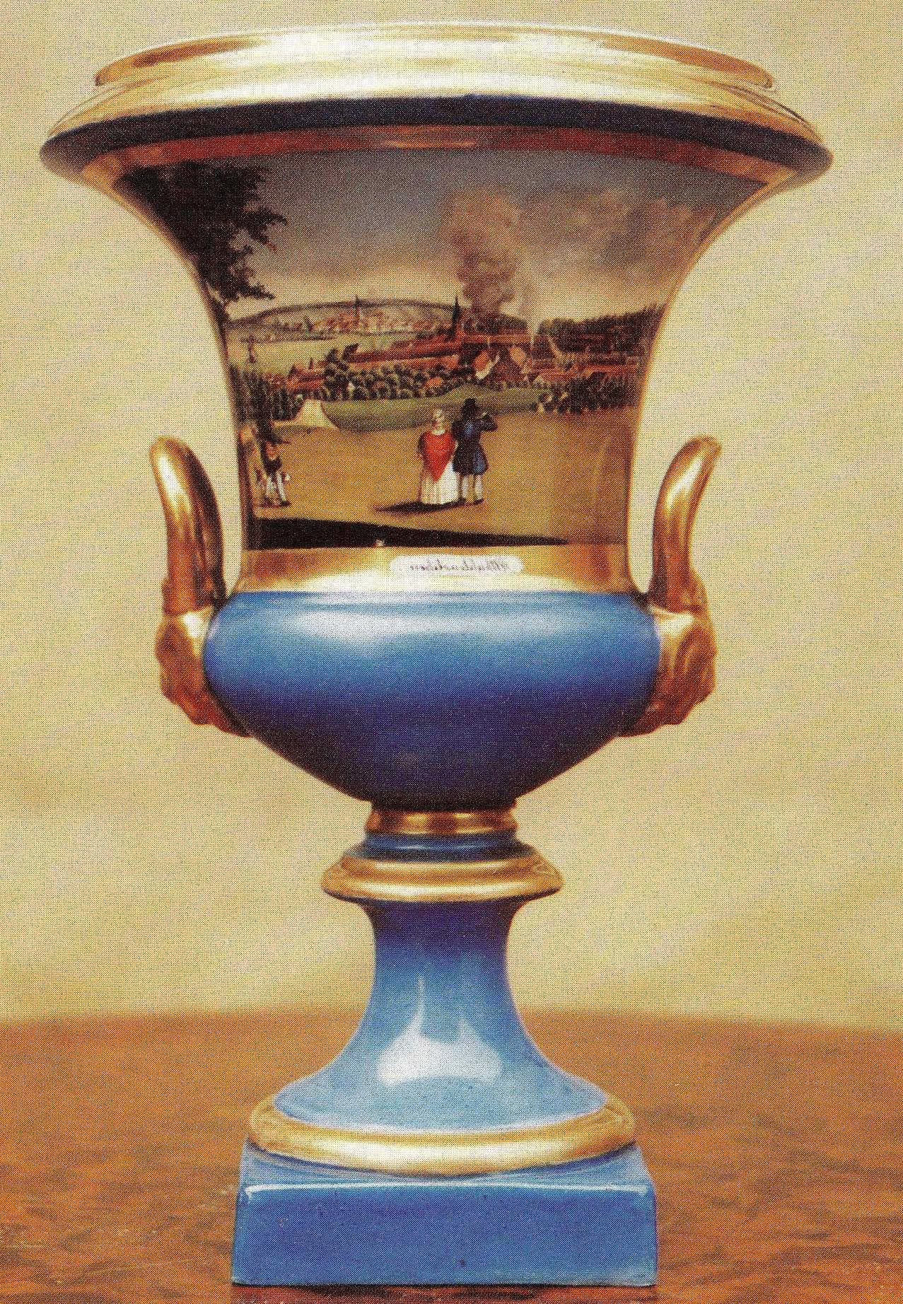 Kratervase aus der Porzellanfabrik der Nathusius Gewerbeanstalten, ca von 1830, Motiv